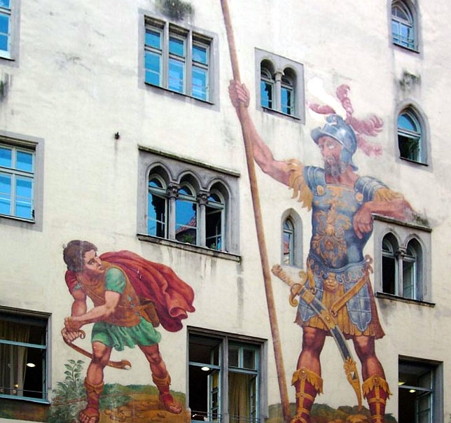 Goliathhaus in Regensburg, Fresko an der Fassade